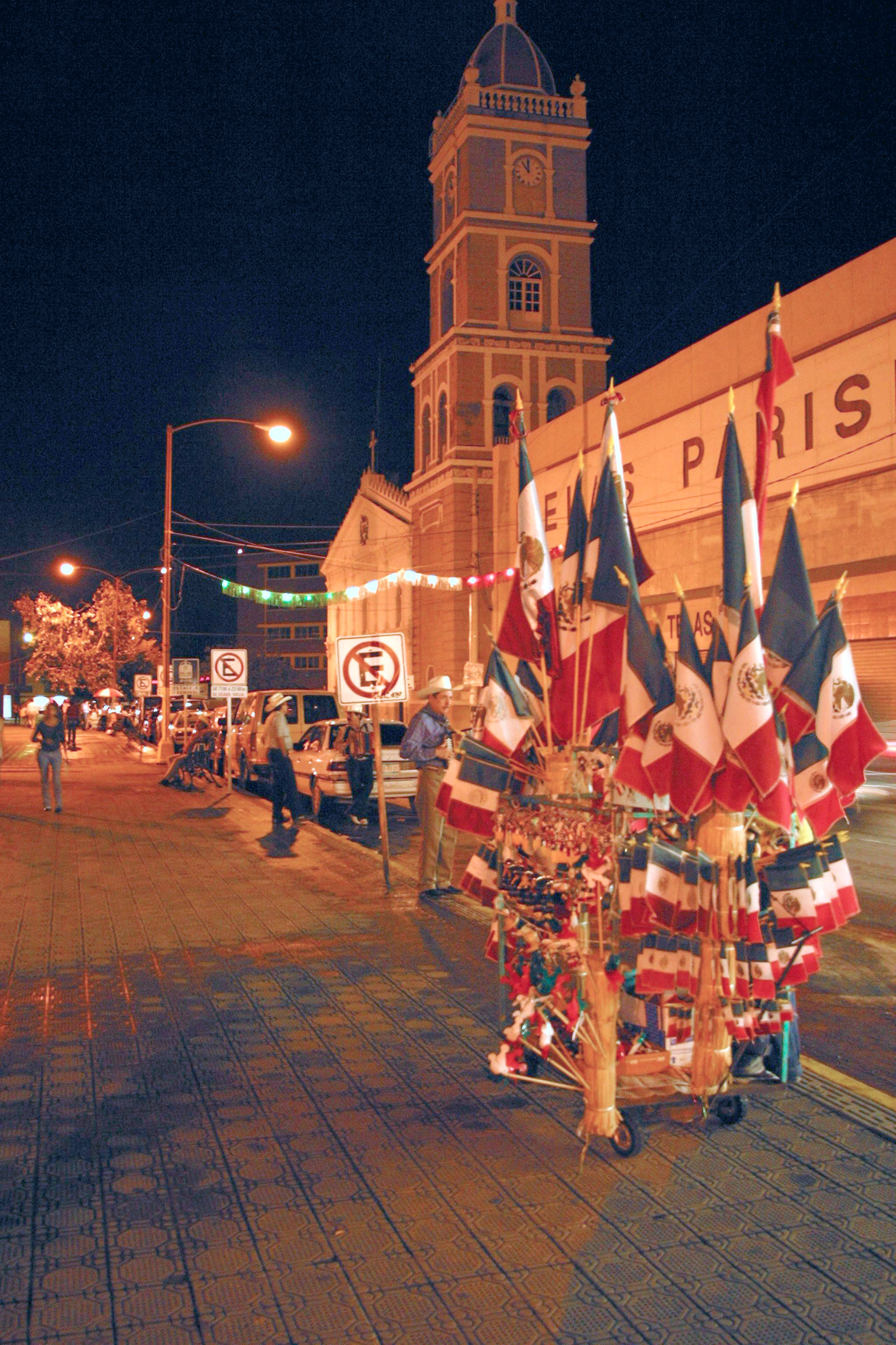 Venta de banderas en el mes de septimebre en la Plaza Juárez de Ciudad Victoria, Tamaulipas, México. Al fondo se ve la Basílica.